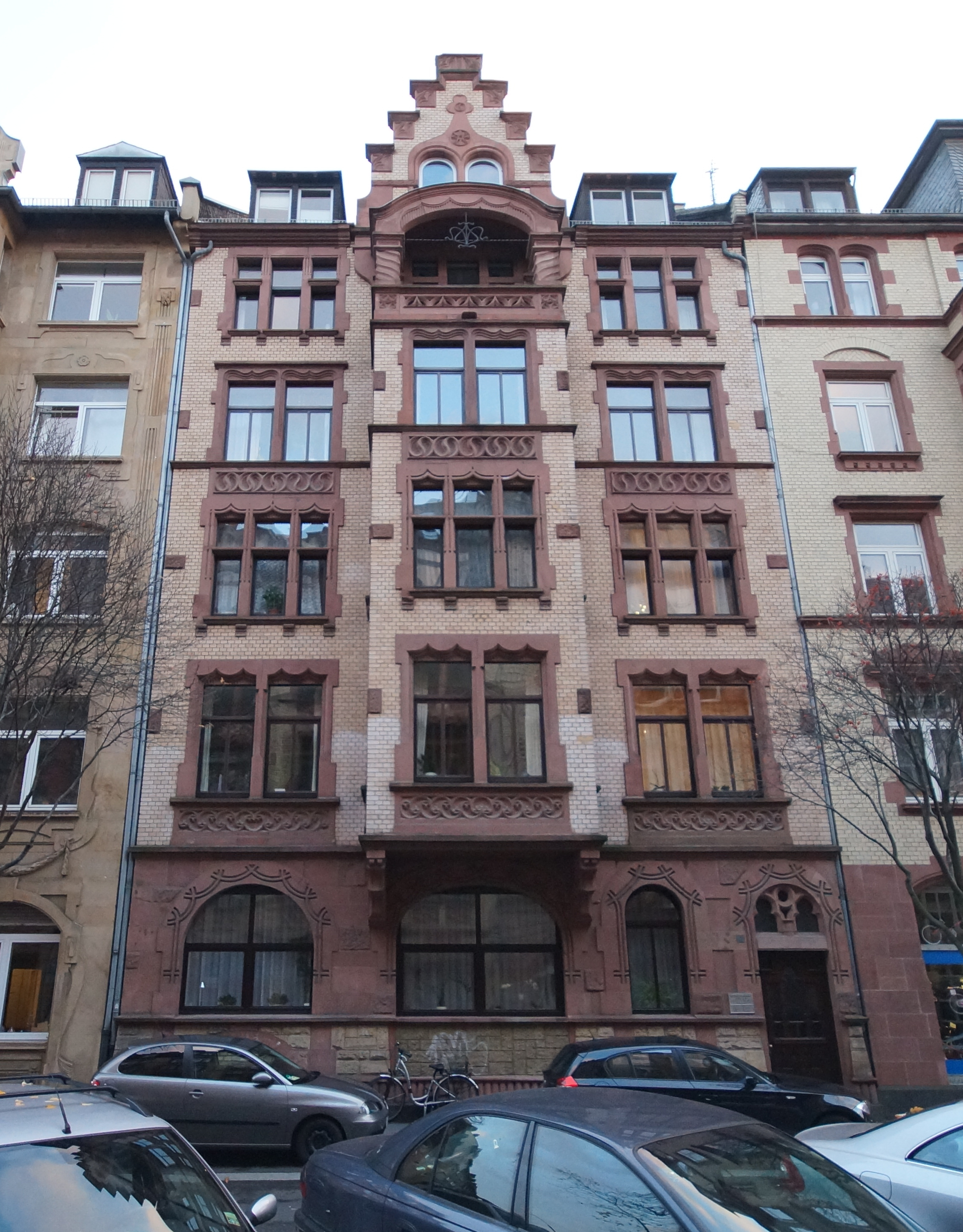 Die Fassade der Albinistraße Nr. 13 in Mainz-Altstadt in der Denkmalzone Albinistraße